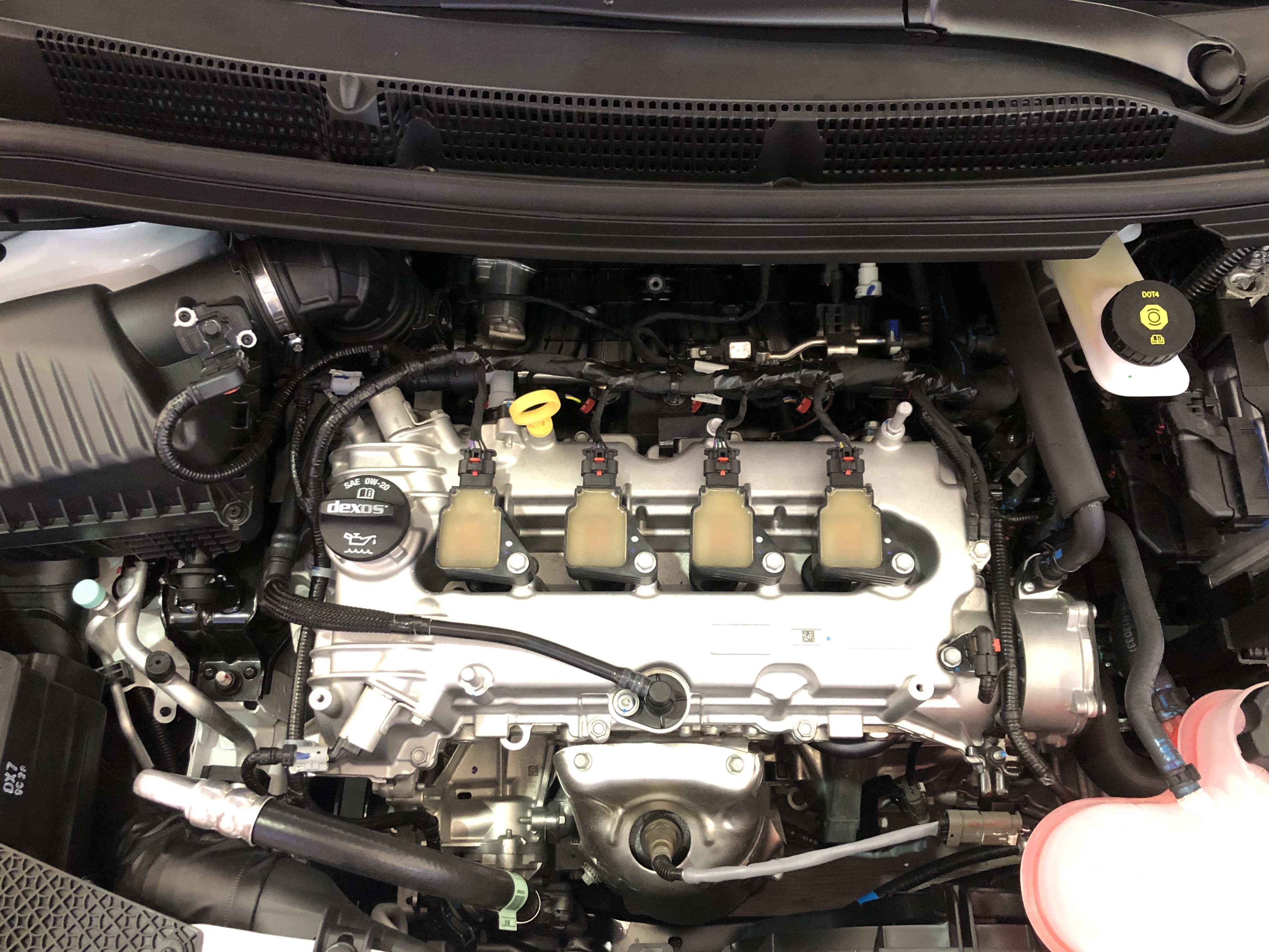 Động cơ VinFast Fadil 2019 tại Times City